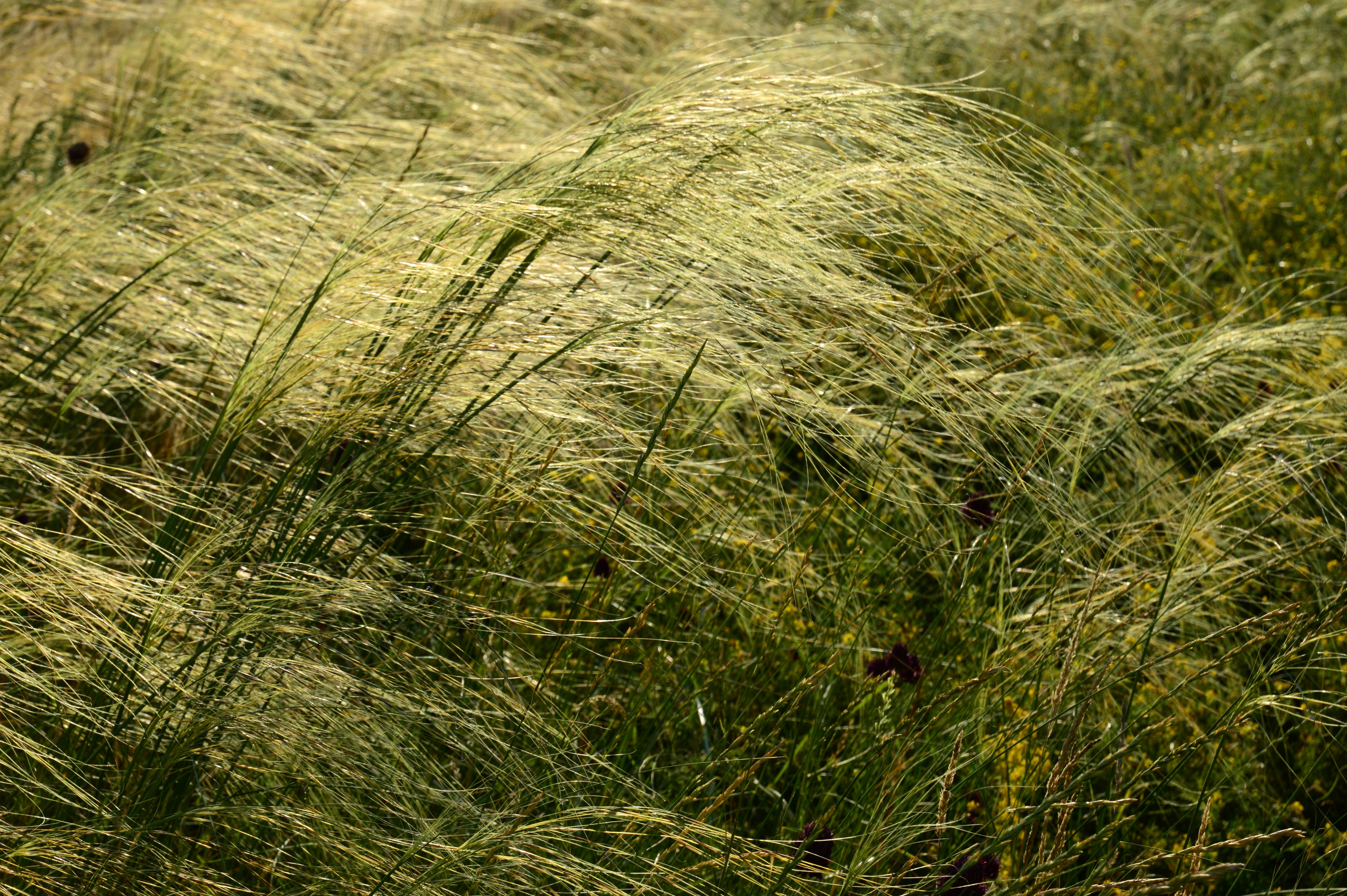 Ковила волосиста (Stipa capillata) на високому березі р. Рось, смт. Стеблів